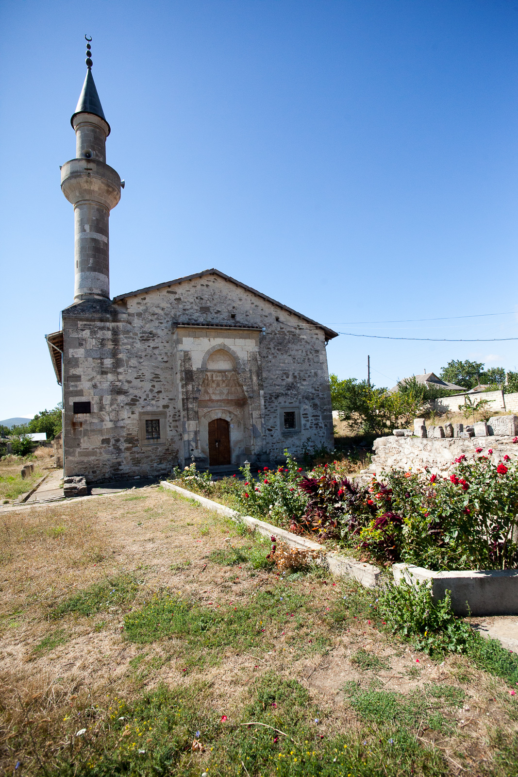 Мечеть Узбека і медресе